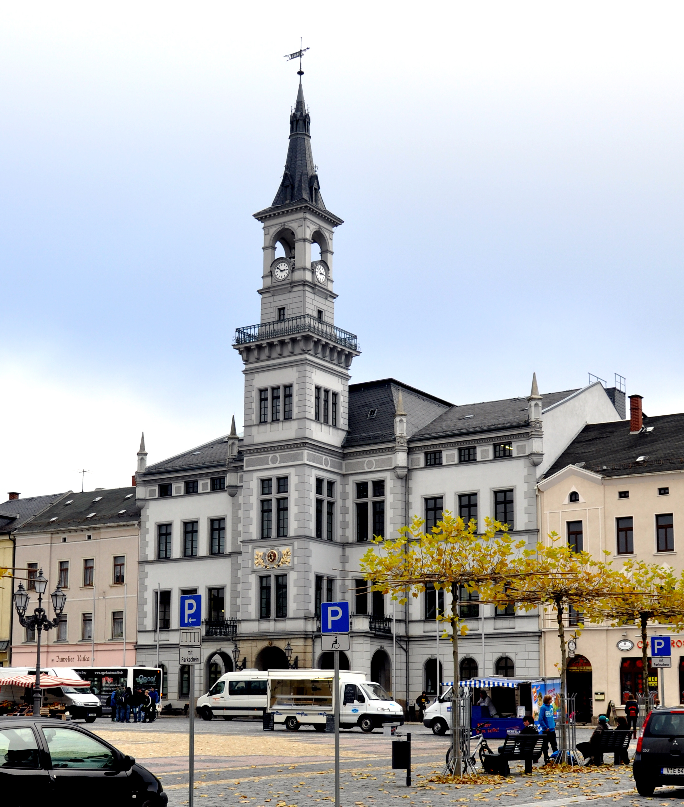 Oelsnitz/Vogtland, Rathaus